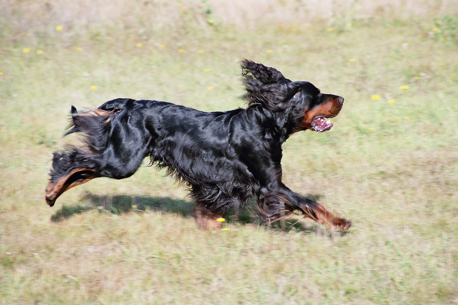 Das Bild zeigt einen Gordon Setter bei der rassentypischen Arbeit im Feld.